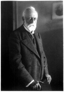 Scan eines alten Familienfotos